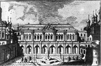 Южный фасад Кремлевского Зимнего дворца